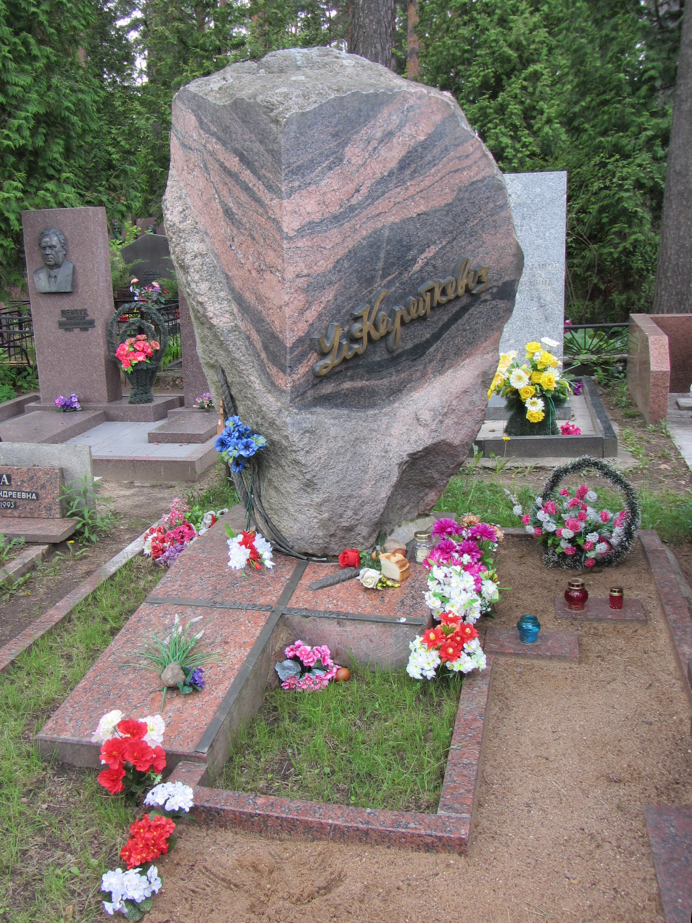 Беларуская (тарашкевіца): Магіла Ўладзімера Караткевіча на Ўсходніх (Маскоўскіх) могілках у Менску.